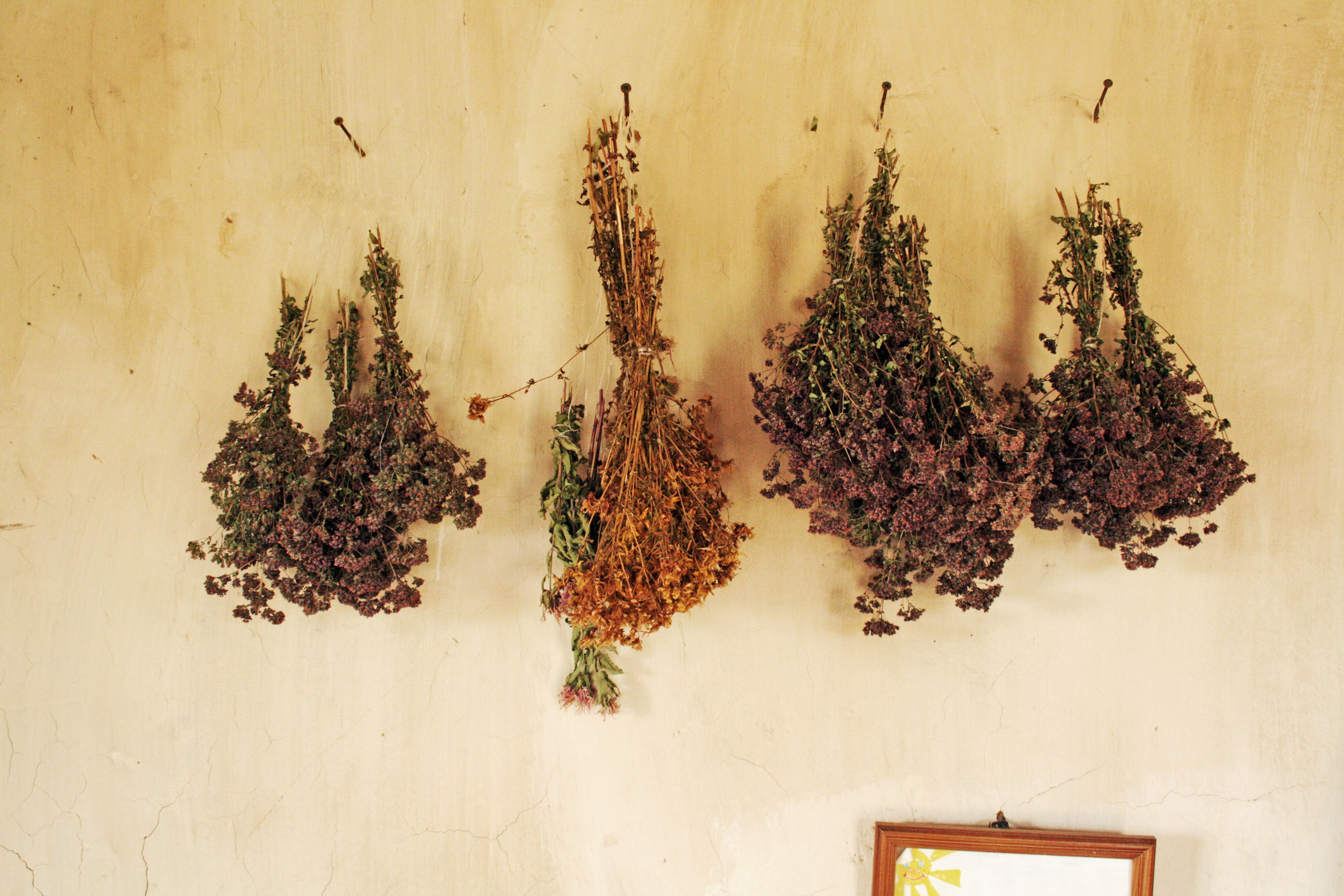 Сушка трав